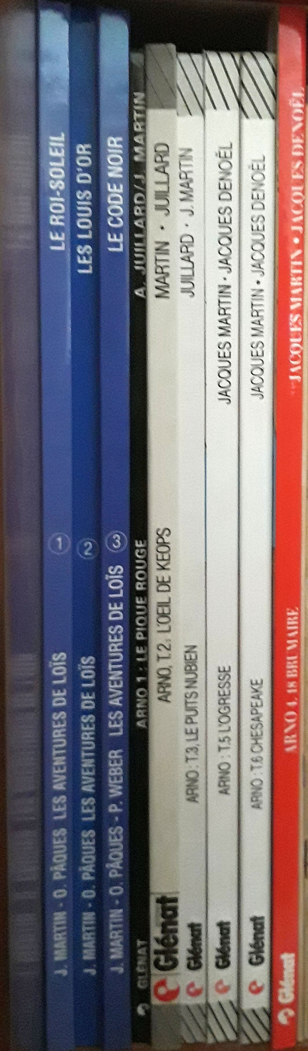 Arno and Lois part